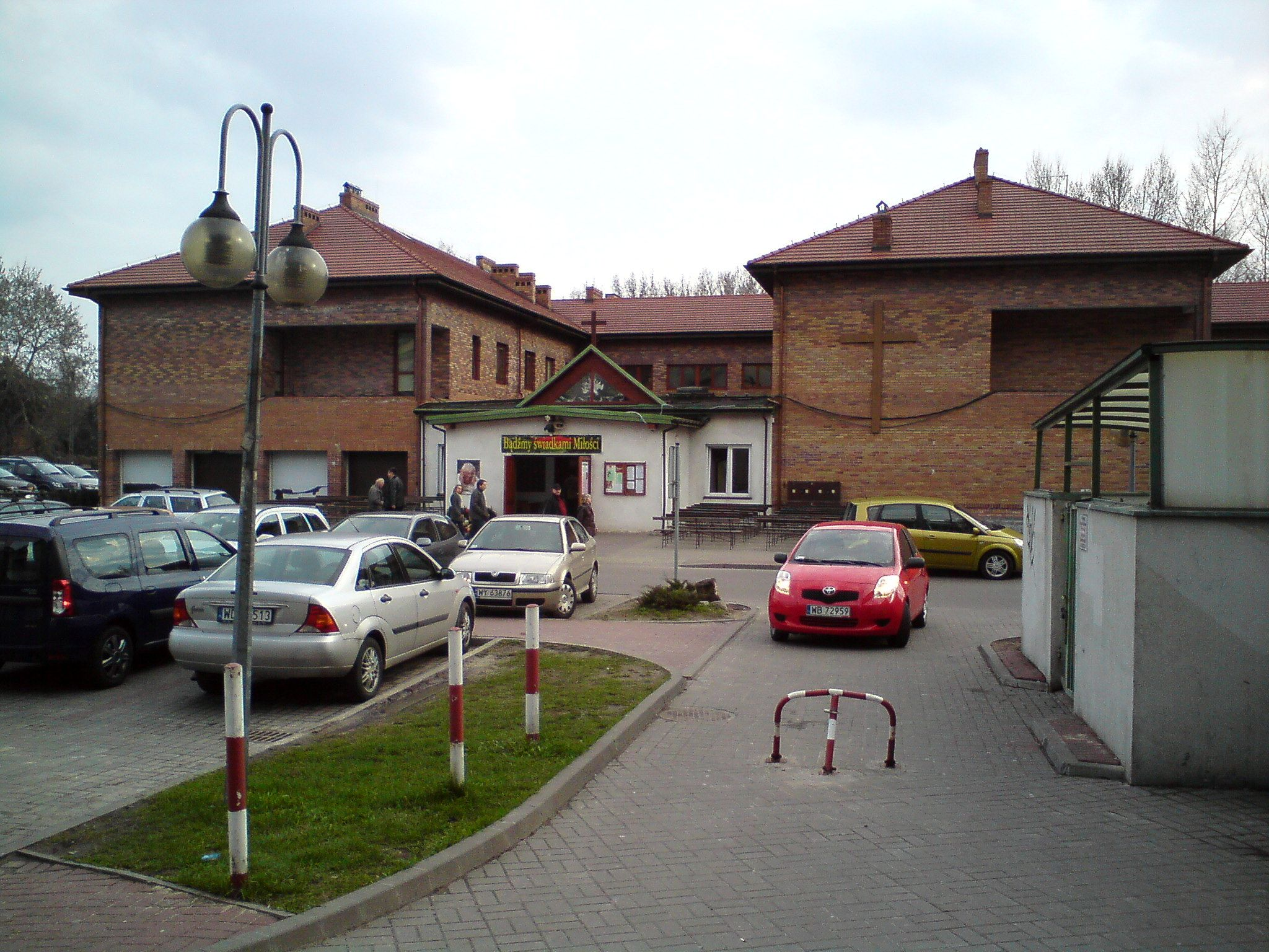 Kościół św. Łukasza Ewangelisty na Górcach